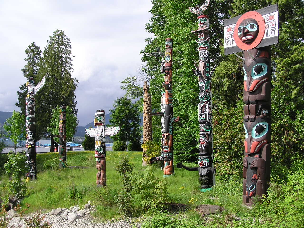 Totempfähle im Stanley Park, Vancouver